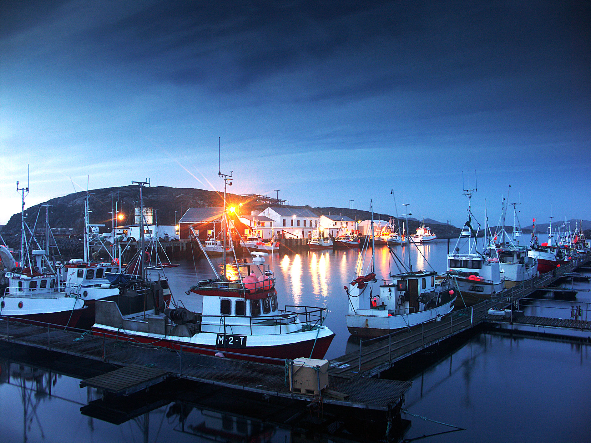 Vandsøy, Vikna, Norway